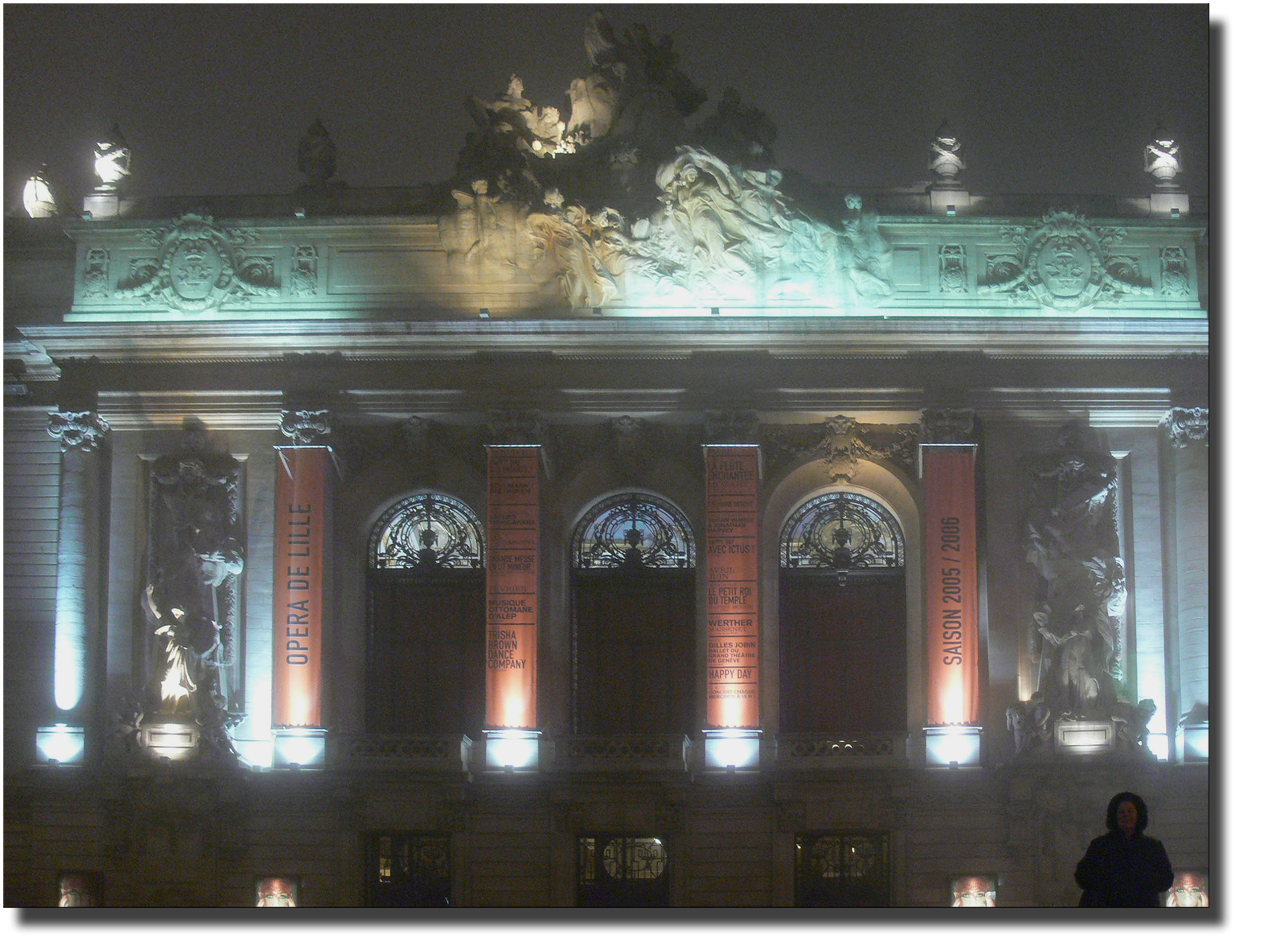 Façade de l’opéra de Lille, photographié de nuit, en 2006, Photo de F. Lamiot / Licence Creative Commons CC-BY-SA.